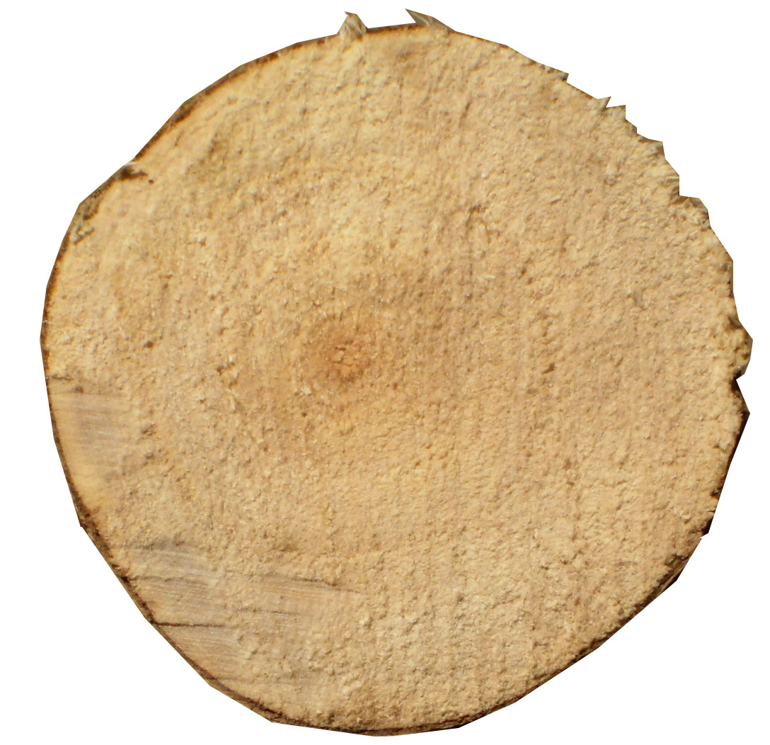 Mặt cắt của thân cây chè